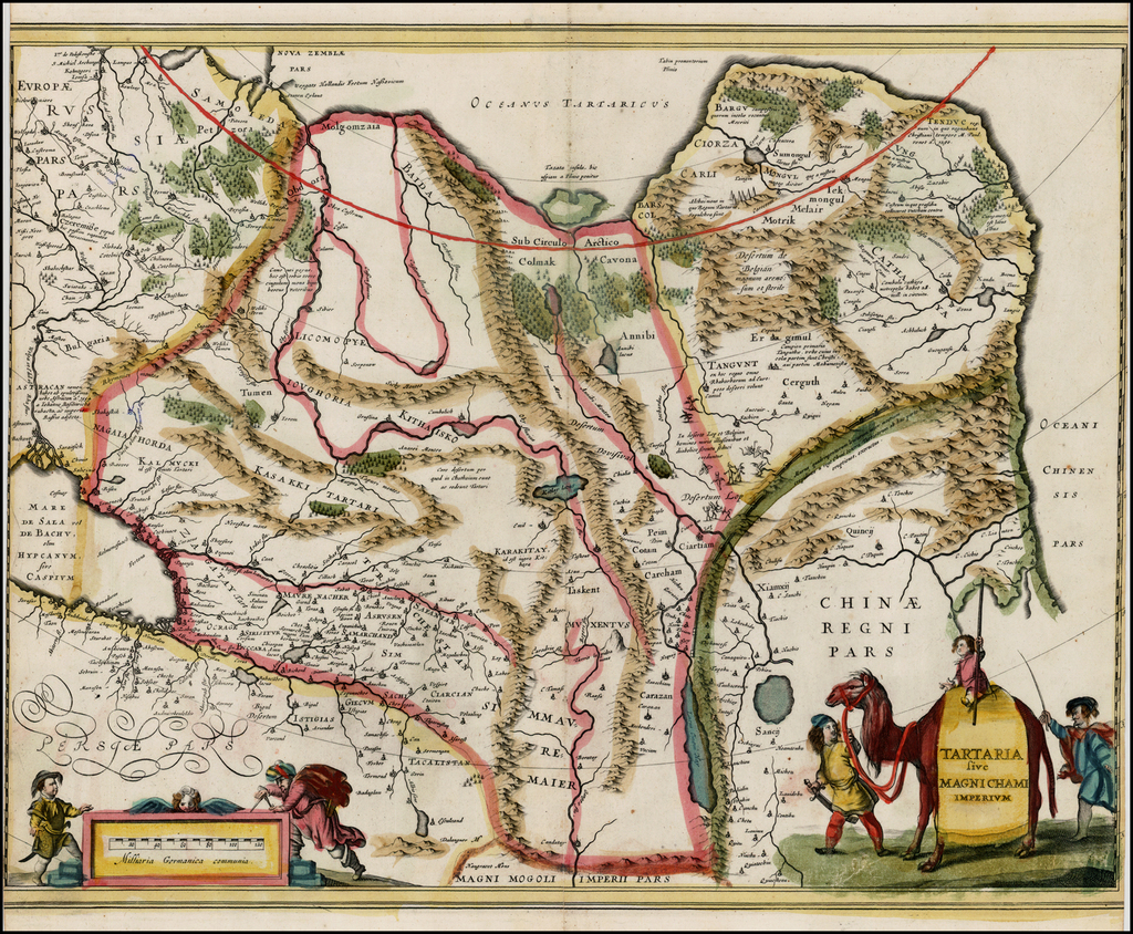 Landkarte des Tatarengebiets (Sibirien) Weitere Titel TARTARIA sive MAGNI CHAMI IMPERIVM Beschreibung Der Titel ist auf dem Satteltuch eines Dromedars vermerkt. Das Tier ist von einem Kind beritten und von zwei erwachsenen Mongolen geführt. Maßkartusche mit zwei Gestalten in Landestracht. Kolorierter Kupferstich, mit Gold gehöht. In: Atlas Blaeu-Van der Hem, Bd. 24:11, fol. 36-37, (11), (AM 10:11)